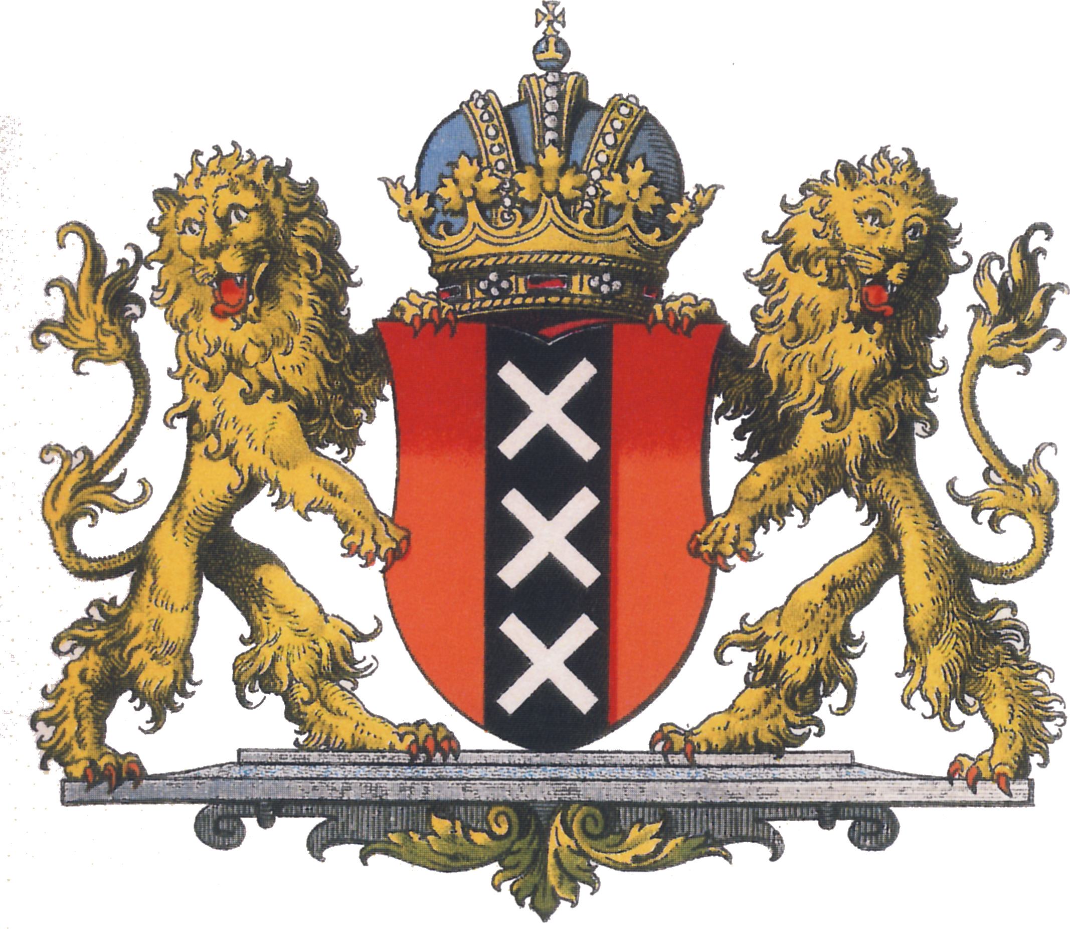 Wappen der Stadt Amsterdam.